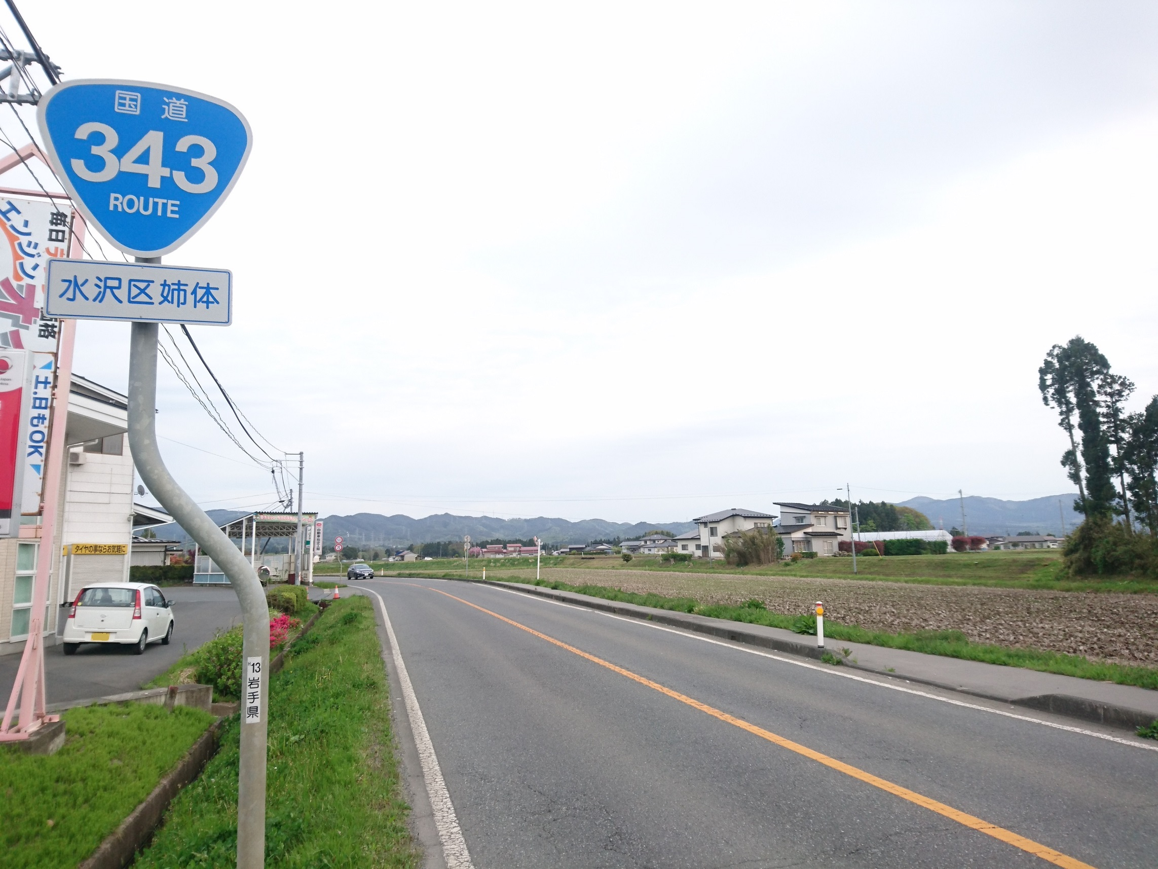 奥州市水沢区姉体町付近の国道343号。